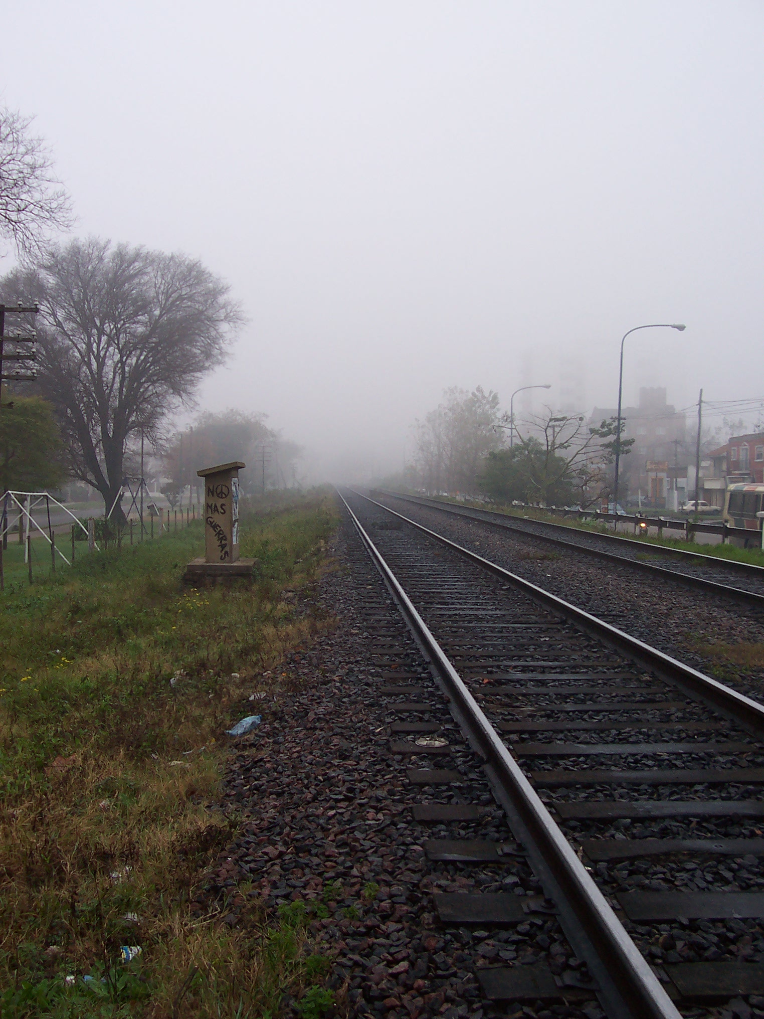 Yo, el creador de este trabajo, lo publico por este medio bajo la siguiente licencia